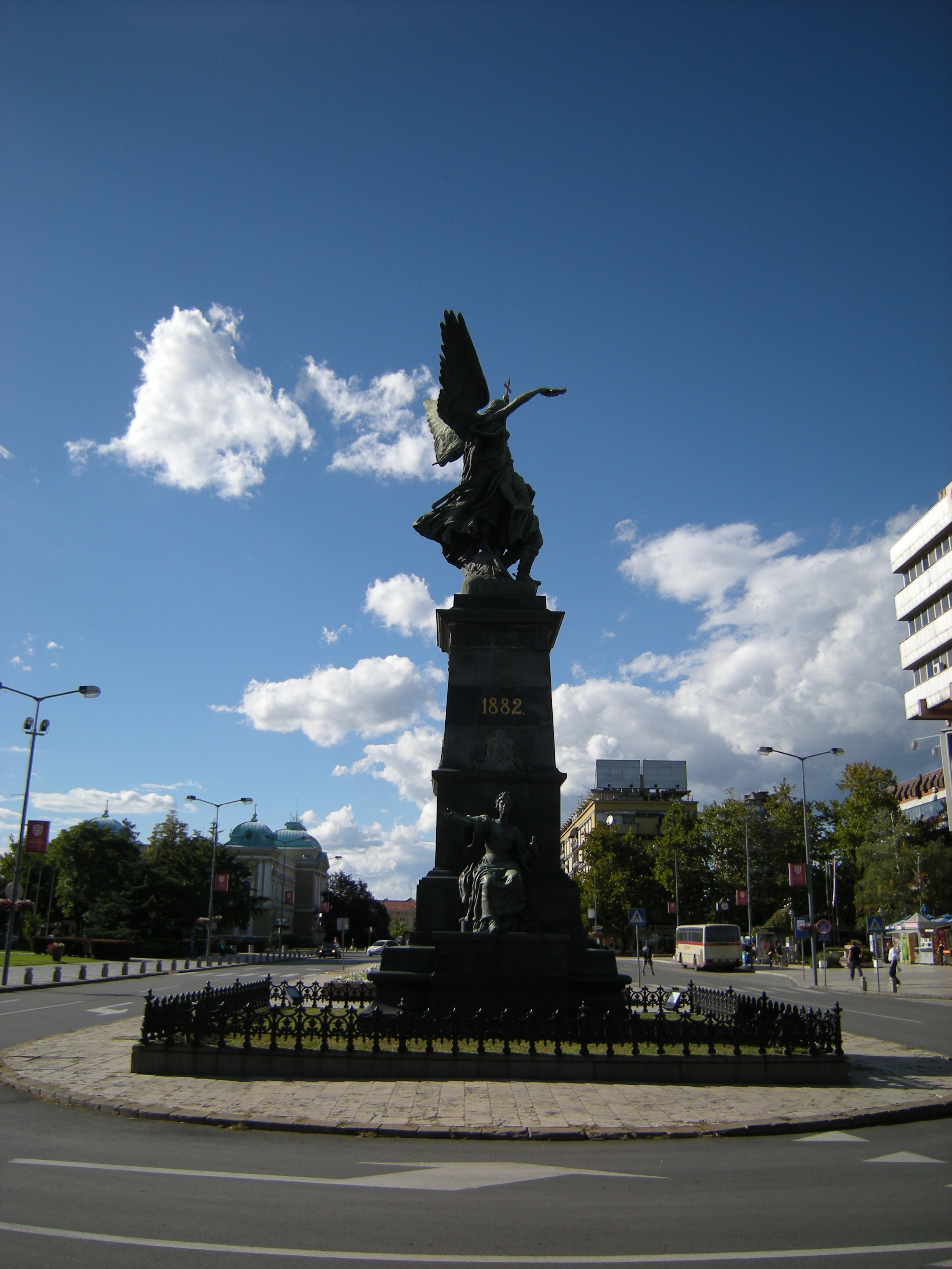 Најпознатије вајарско дело Ђорђа Јовановића о Косовском боју је споменик косовским јунацима на Тргу косовских јунака у Крушевцу, који истовремено представља и симбол Крушевца од 1904. године, када га је свечано открио краљ Петар I Карађорђевић поводом прославе стогодишњице Првог српског устанка. Камен темељац је поставио, поводом прославе прославе 500-годишњице Косовске битке 1889. краљ Александар Обреновић.